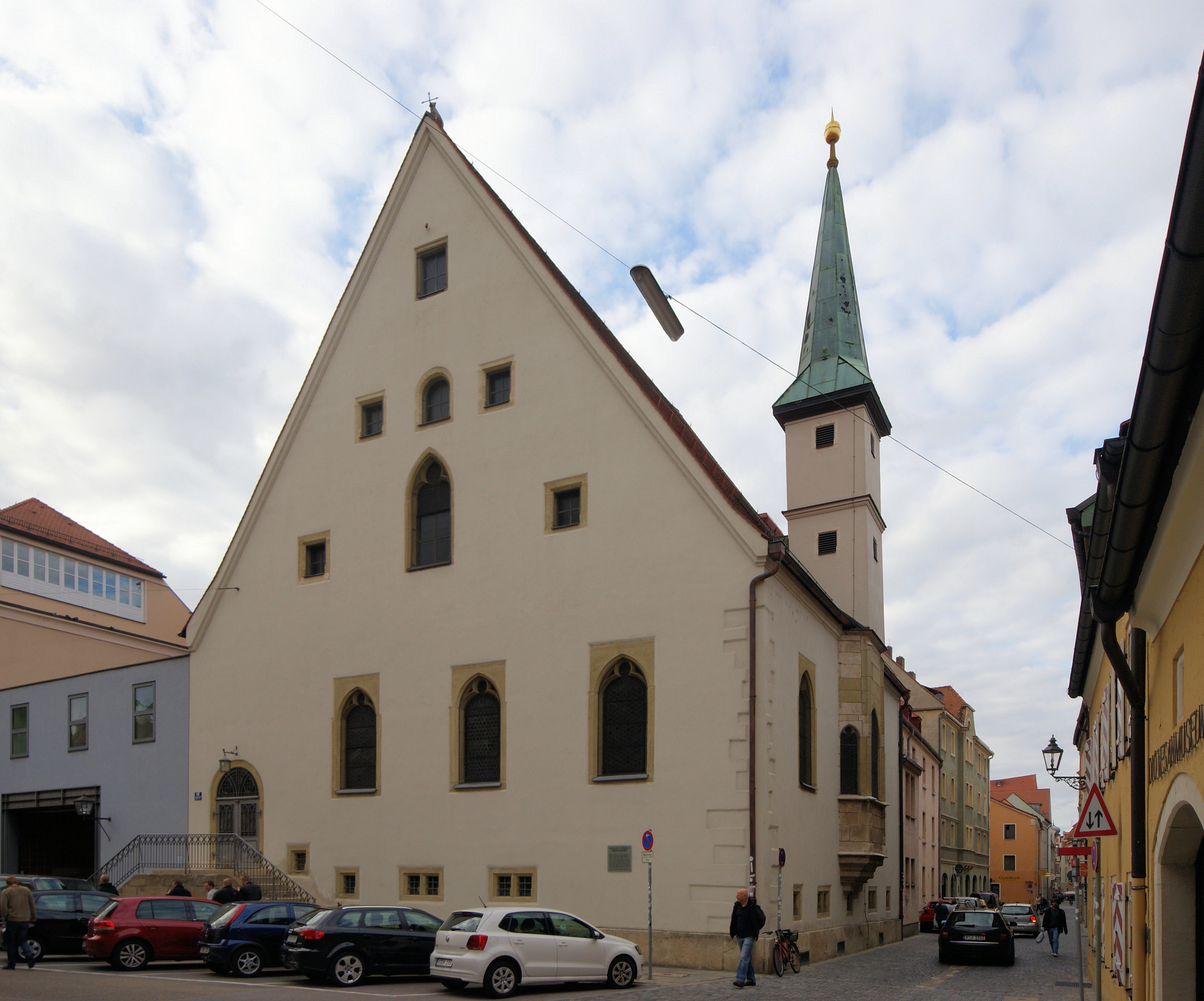 Evang.-Luth. Krankenhauskirche und ehem. Bruderhauskirche St. IgnazThis is a photograph of an architectural monument.